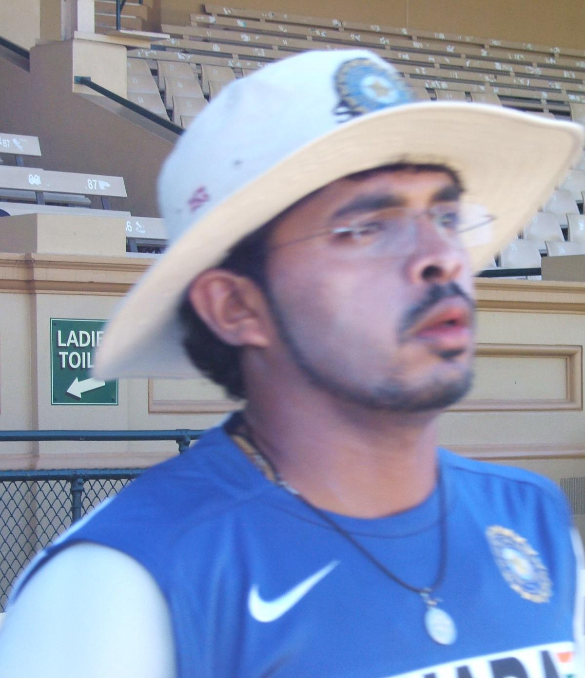 Sreesanth at Adelaide Oval